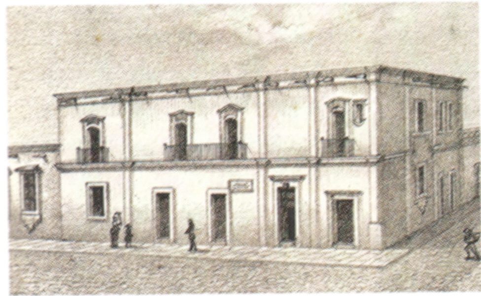 Morelos House in Valladolid